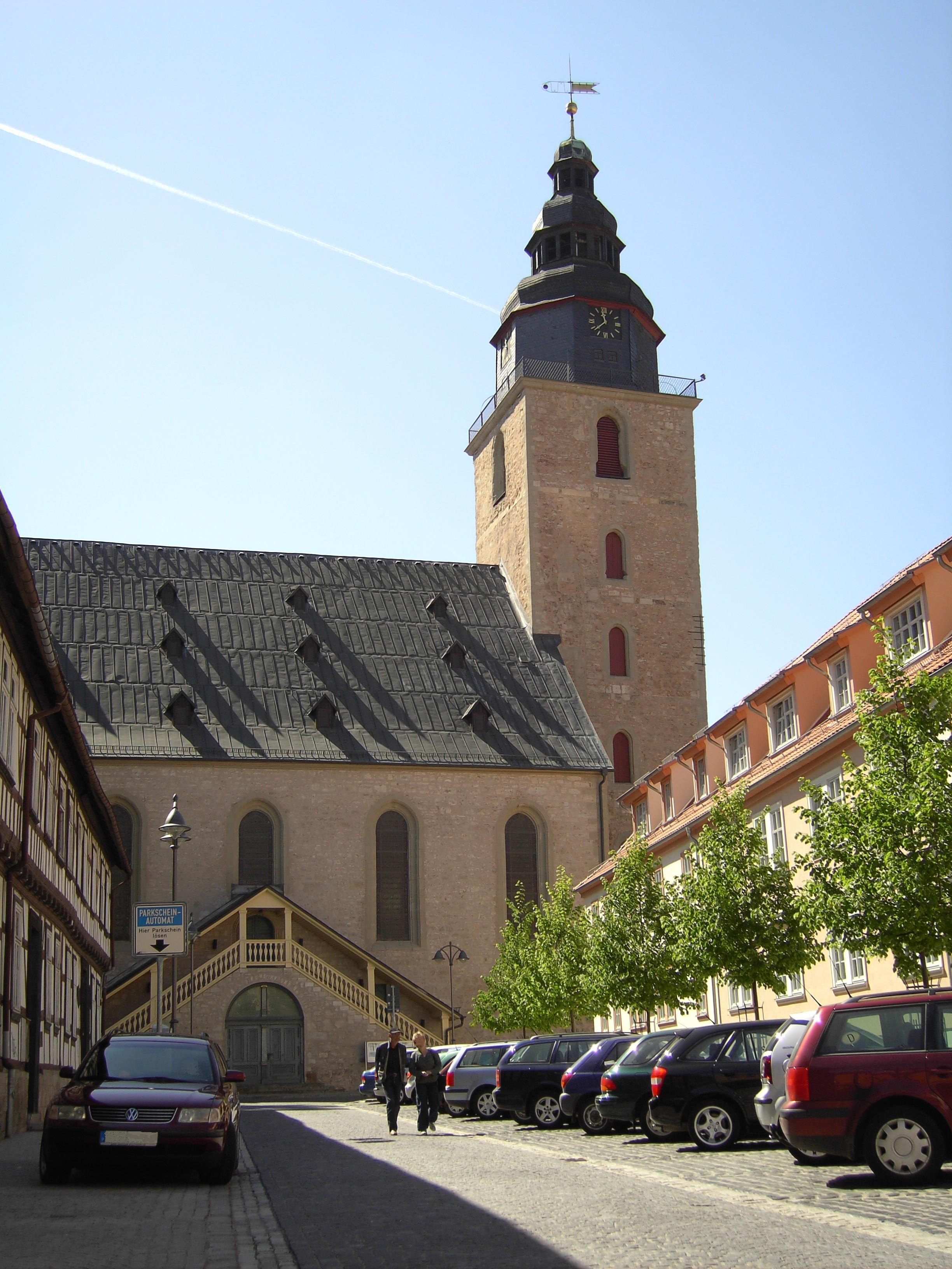 Die Trinitatiskirche in Sondershausen von Norden